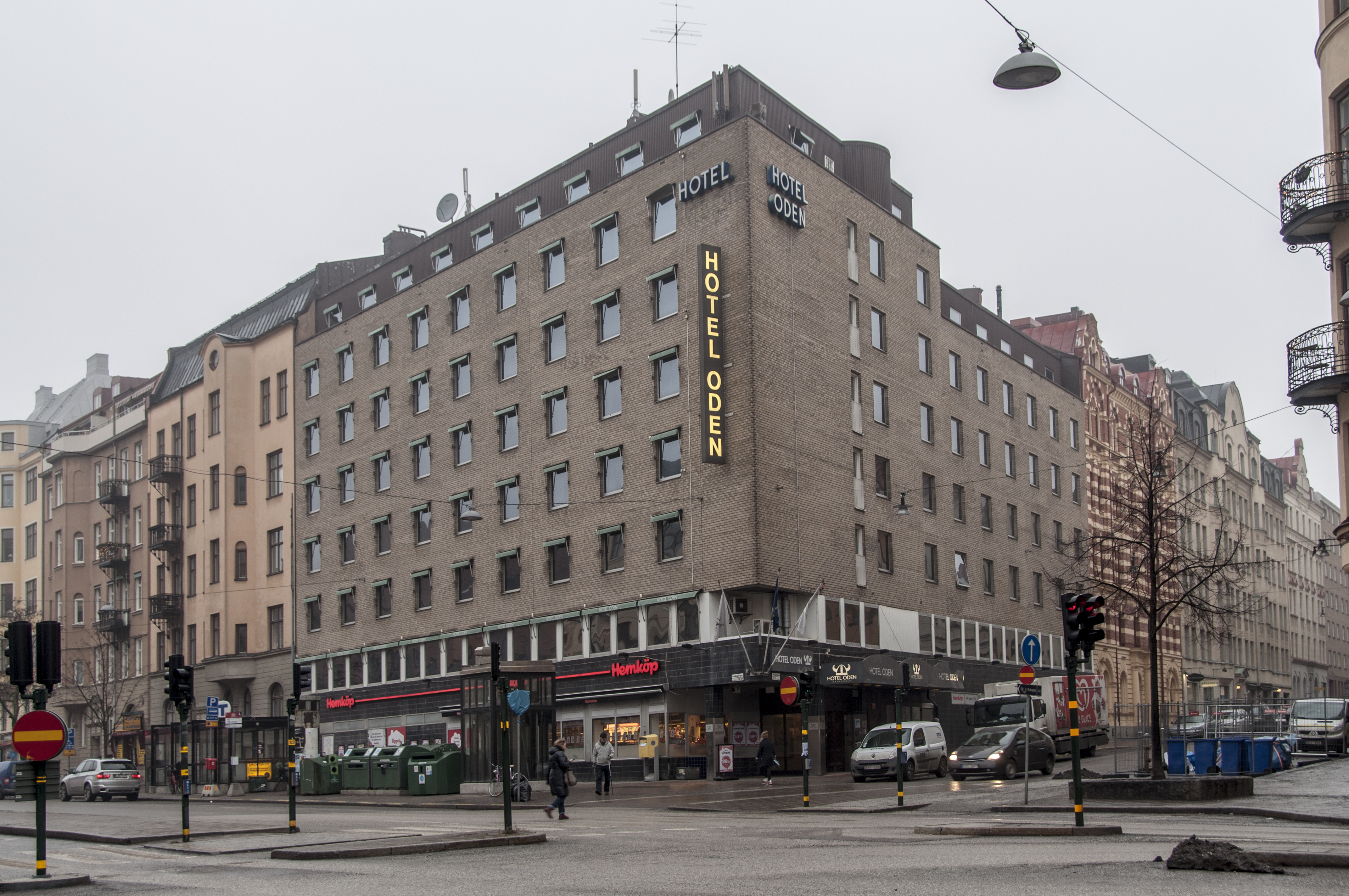 Htotell Oden, Gullvivan 2, Karlbergsvägen 24 / Västmannagatan. Nybyggnadsår 1970 - 1974 Anders Diös AB (Byggherre) Anders Diös AB (Byggmästare) Heiner Moegelin (Arkitekt) Rolf Hagstrand (Arkitekt)